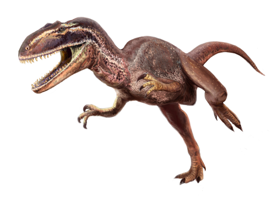 Metriacanthosaurus parkeri.